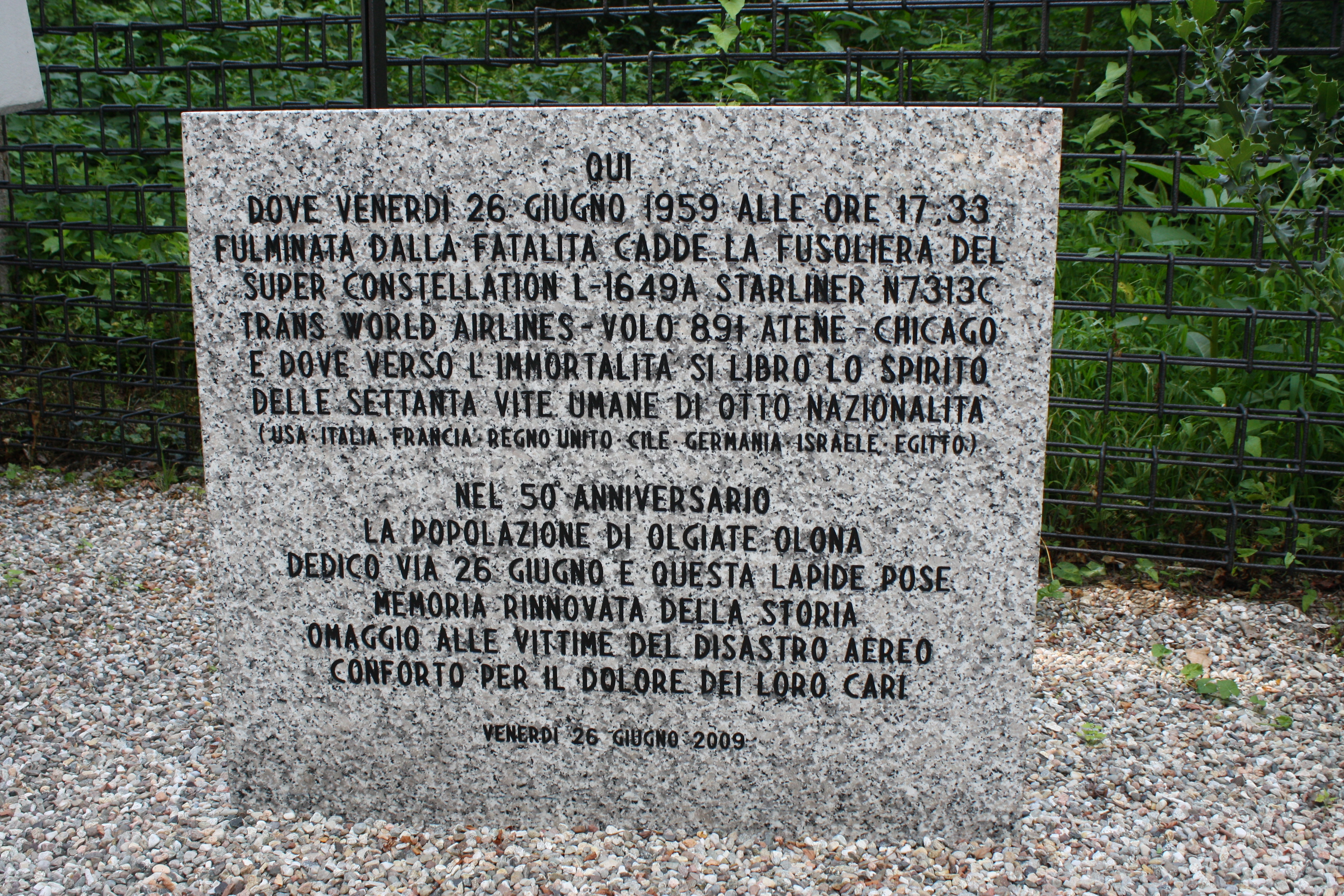 Targa in memoria del disastro aereo di Olgiate Olona (VA) del 26 giugno 1959